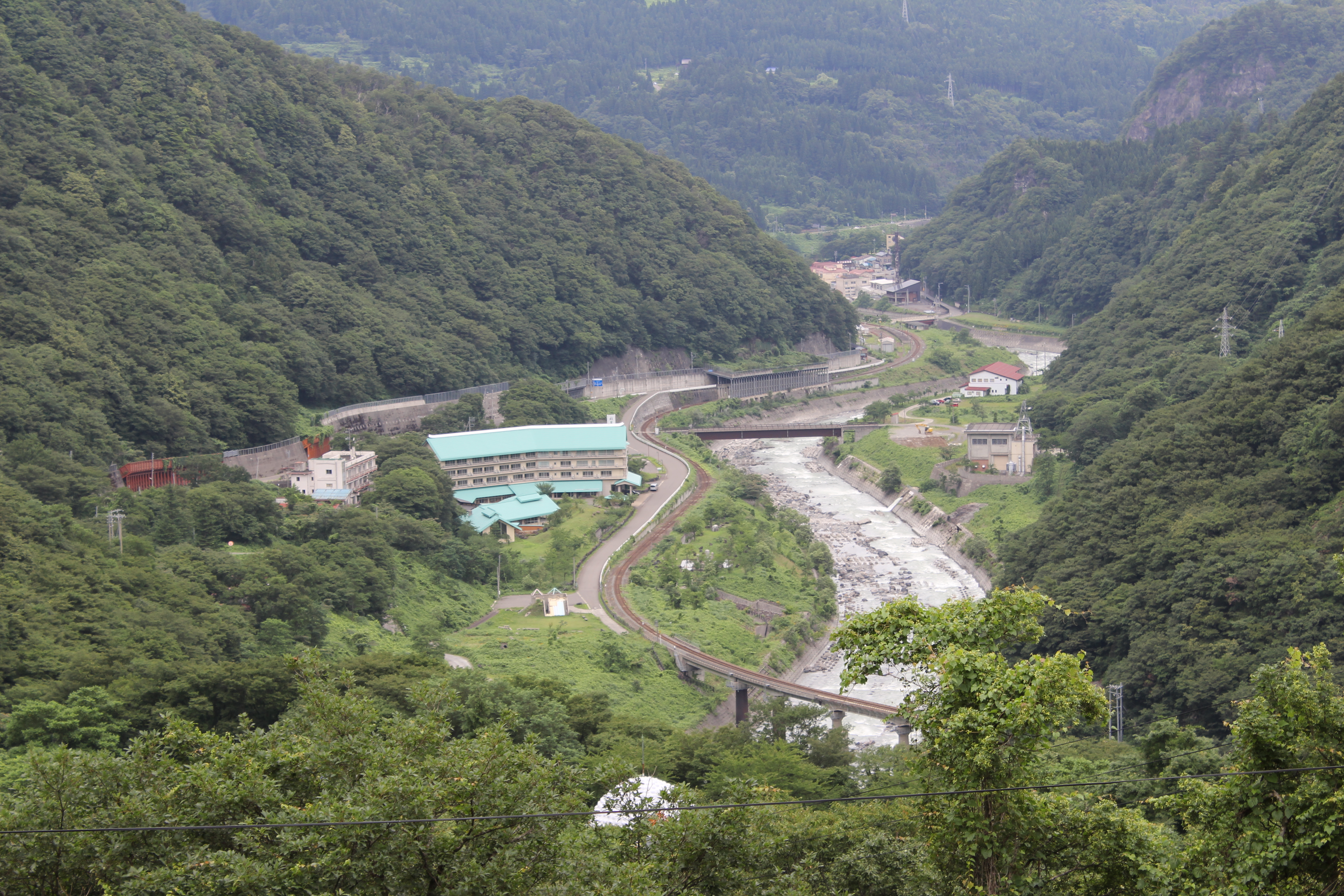 姫川温泉。葛葉峠から見下ろす。